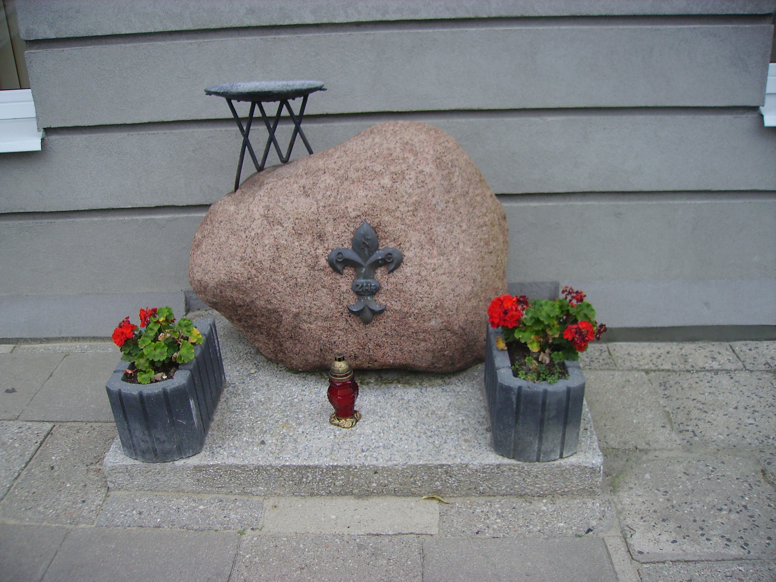 Harcerska lilijka upamiętniająca śmierć instruktorów i harcerzy w czasie II wojny światowej. Białystok ul. Ogrodowa - III LO